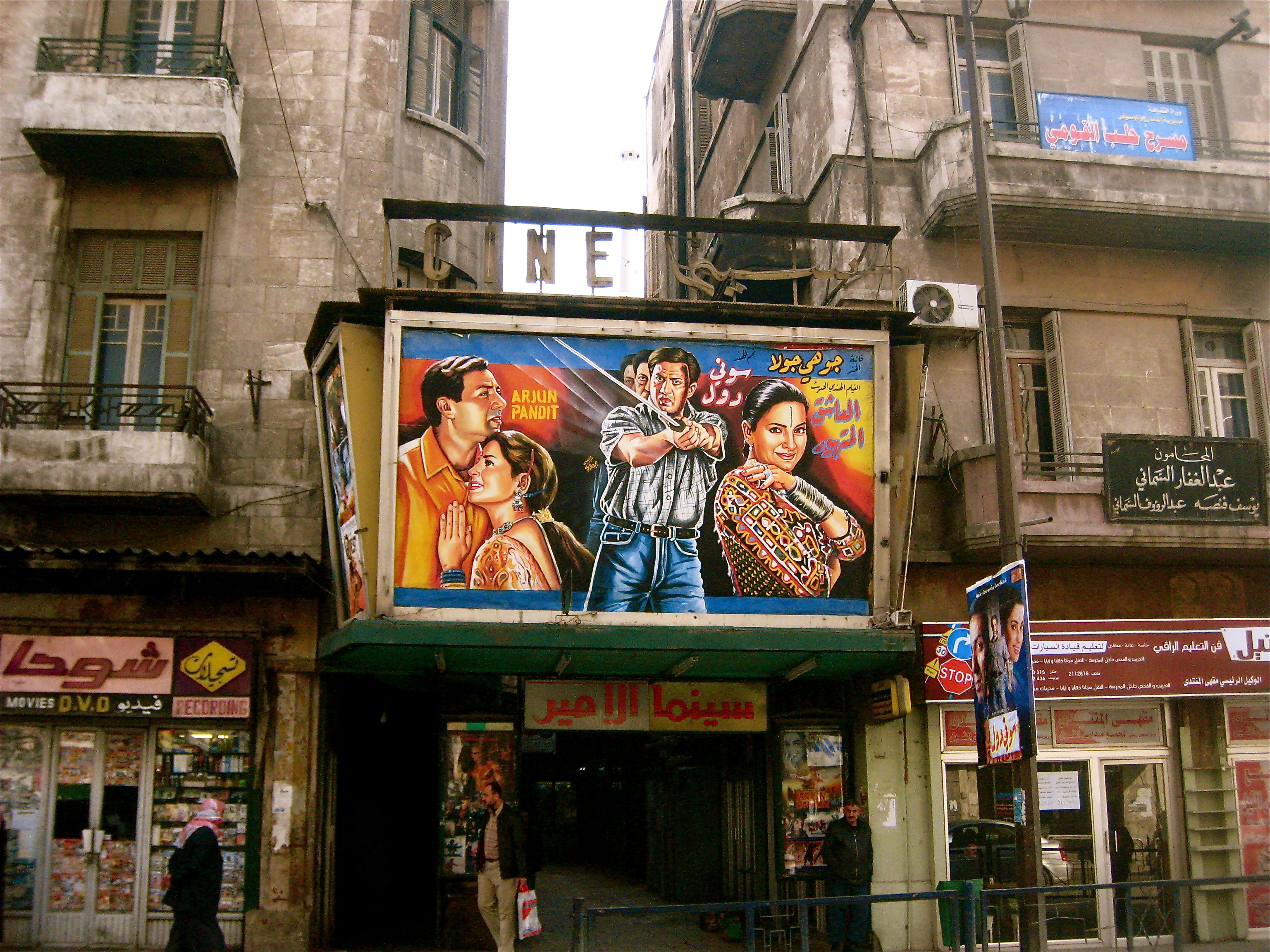 Cinema in Aleppo, Syria